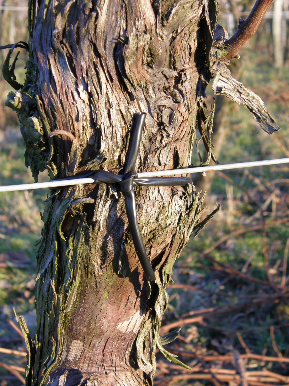 Altweiberknoten an einem Rebstock